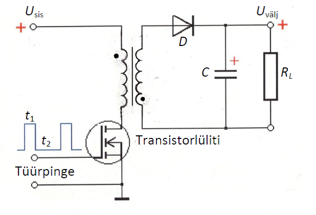 Enda tehtud